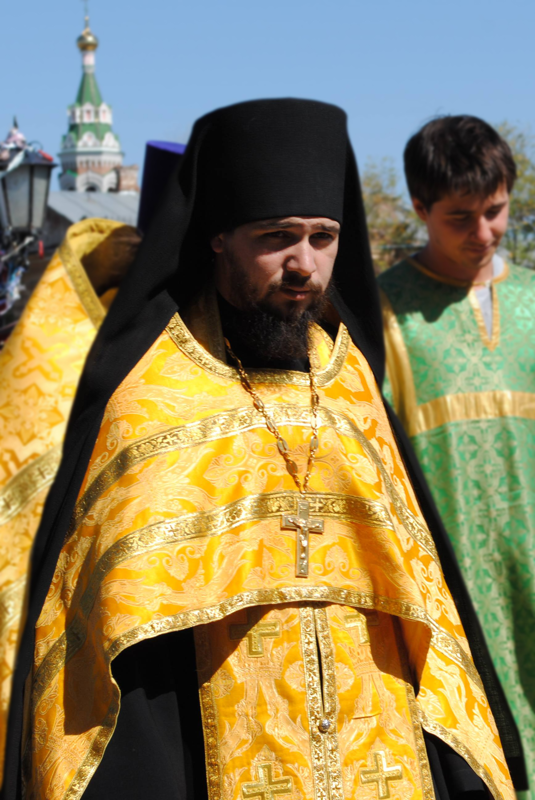 иеромонах Антоний на крестном ходе в Астрахани